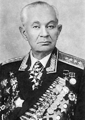 Станислав Гилярович Поплавский (1902 — 1973) — советский военачальник, Герой Советского Союза